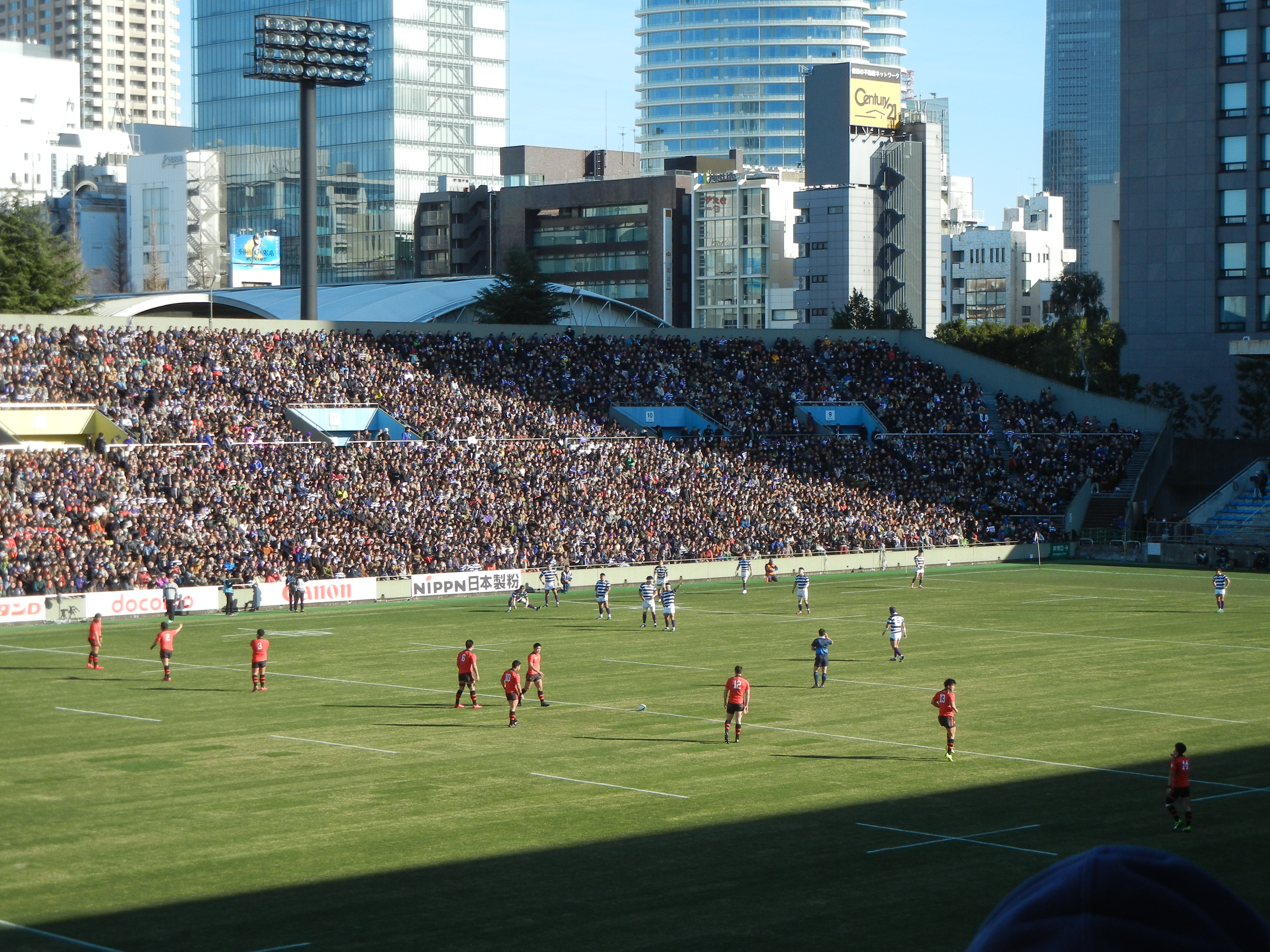 第54回ラグビー大学選手権決勝 帝京大学対明治大学